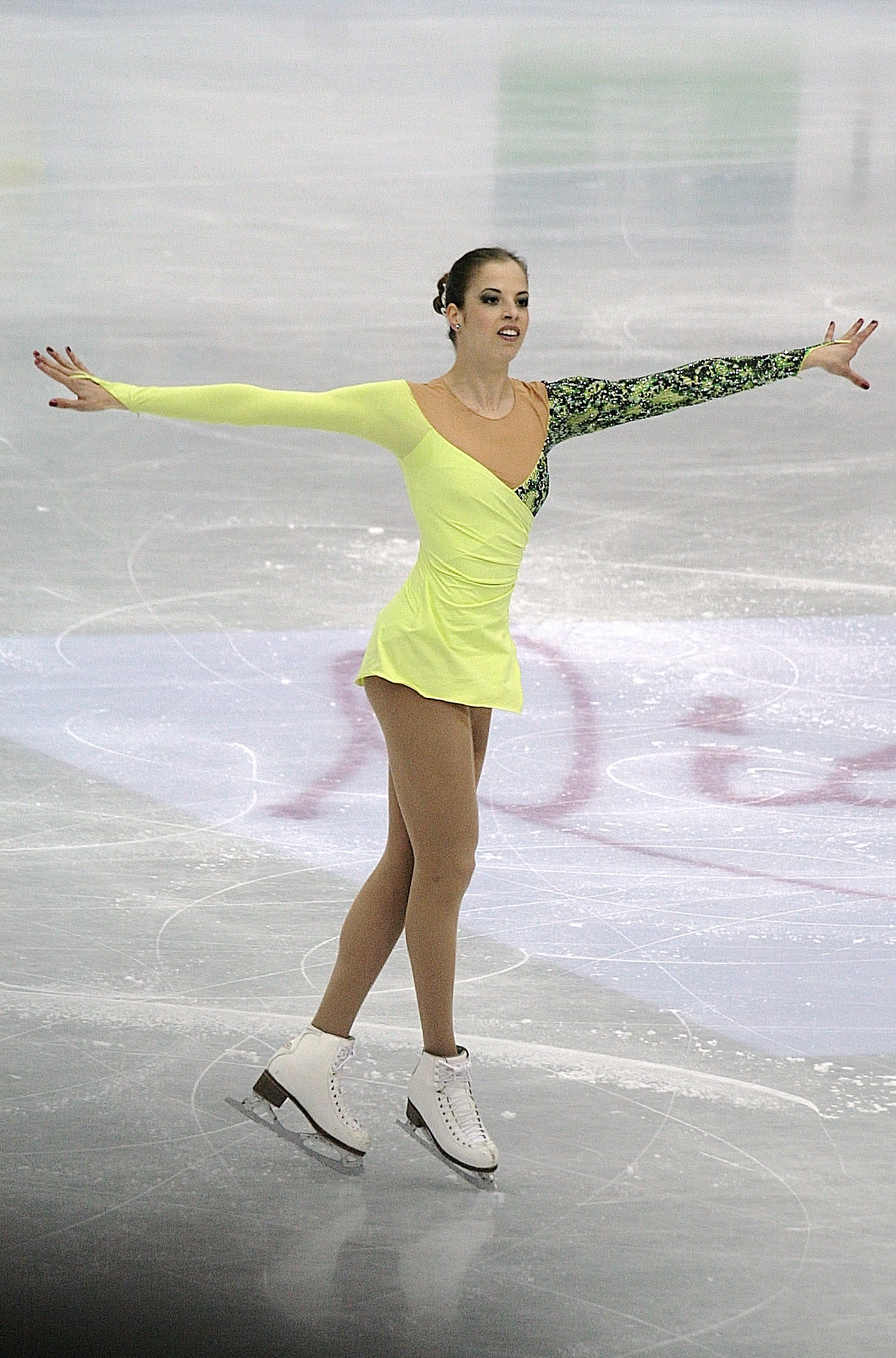 Каролина Костнер (Италия) на чемпионате мира по фигурному катанию 2012